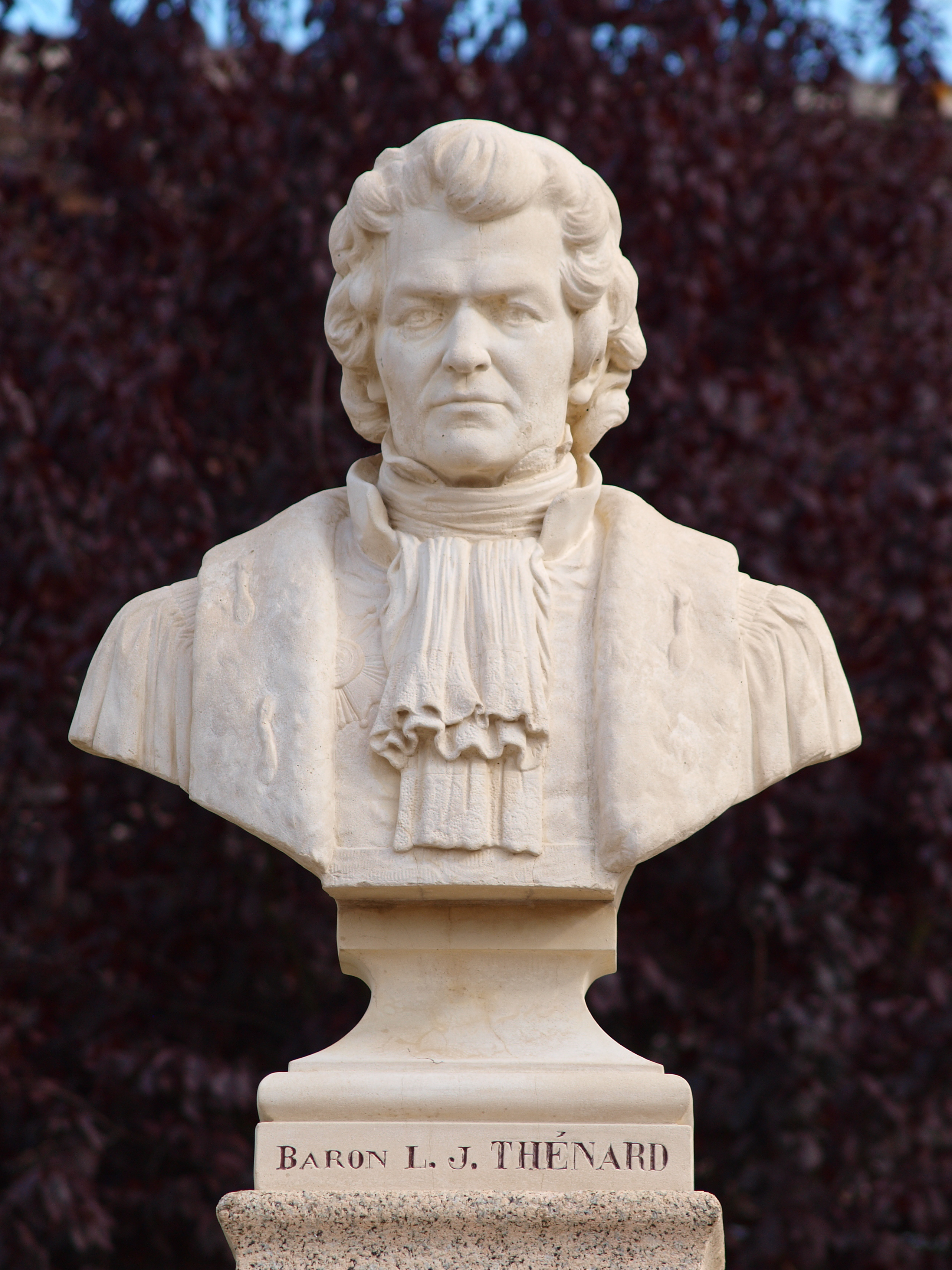 La Louptière-Thénard (Aube, France) ; Louis Jacques Thénard